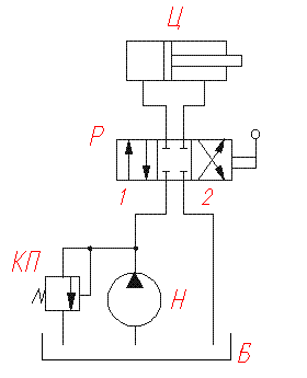 Простейшая гидросхема